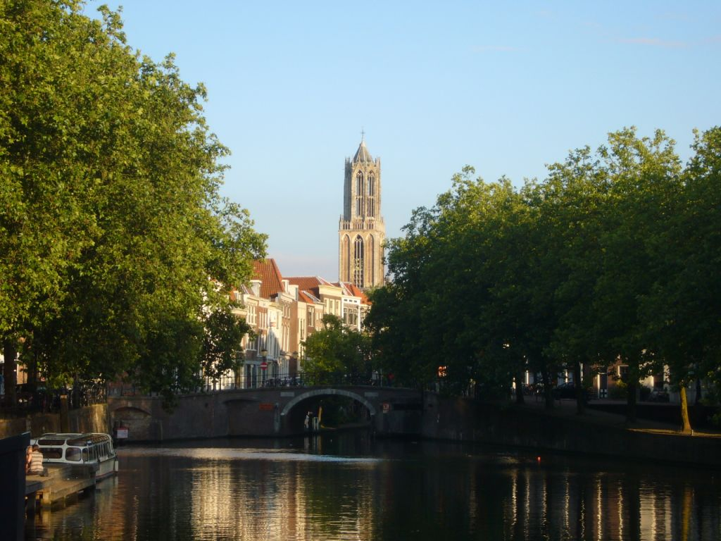 Gezicht vanaf Weerdsluis naar Oudegracht met Domtoren, Utrecht